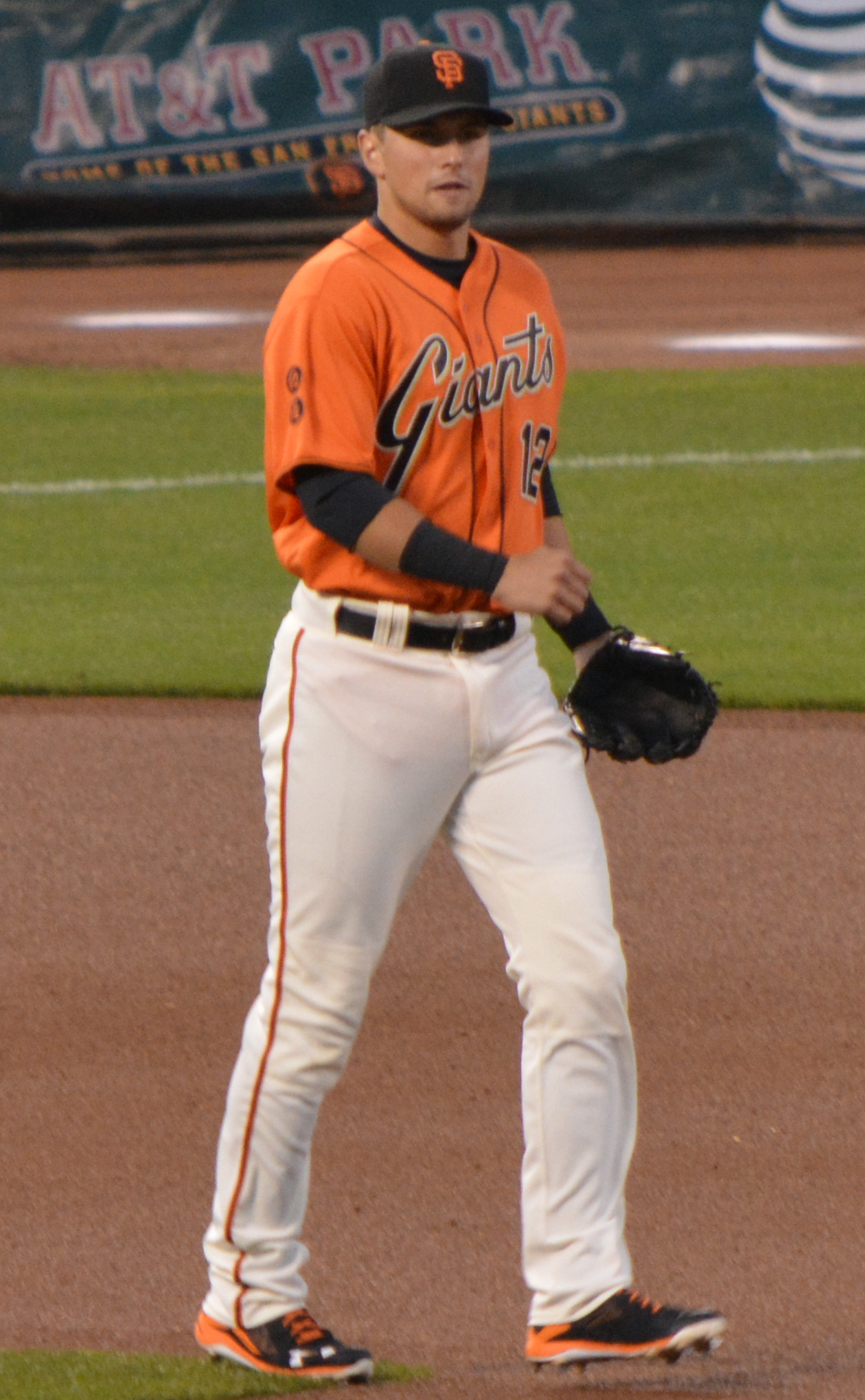 Joe Panik